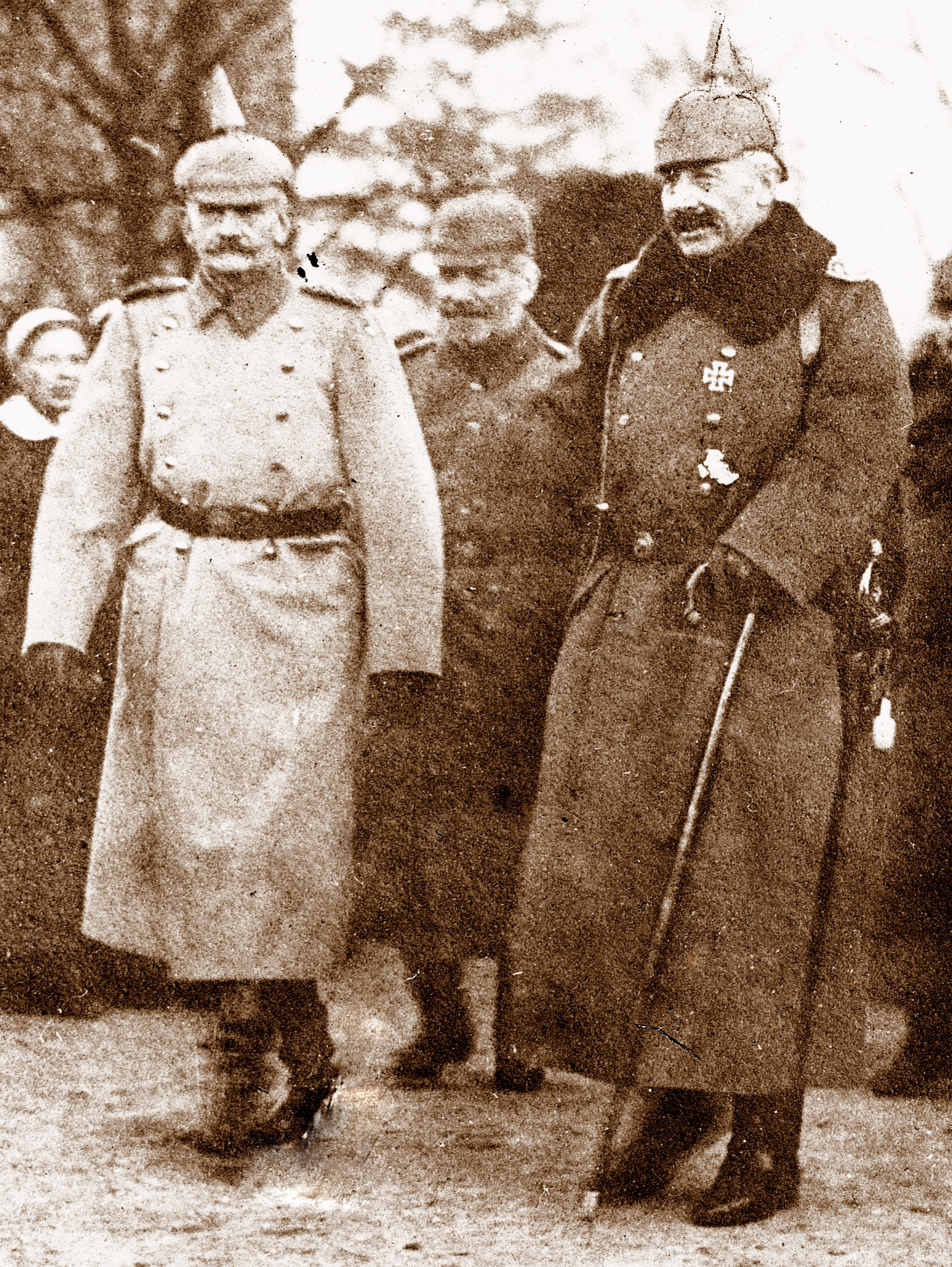 Landtagspräsident (Großherzogtum Sachsen) Dr. Alfred Appelius mit Kaiser Wilhelm II. im Felde (1. Weltkrieg)